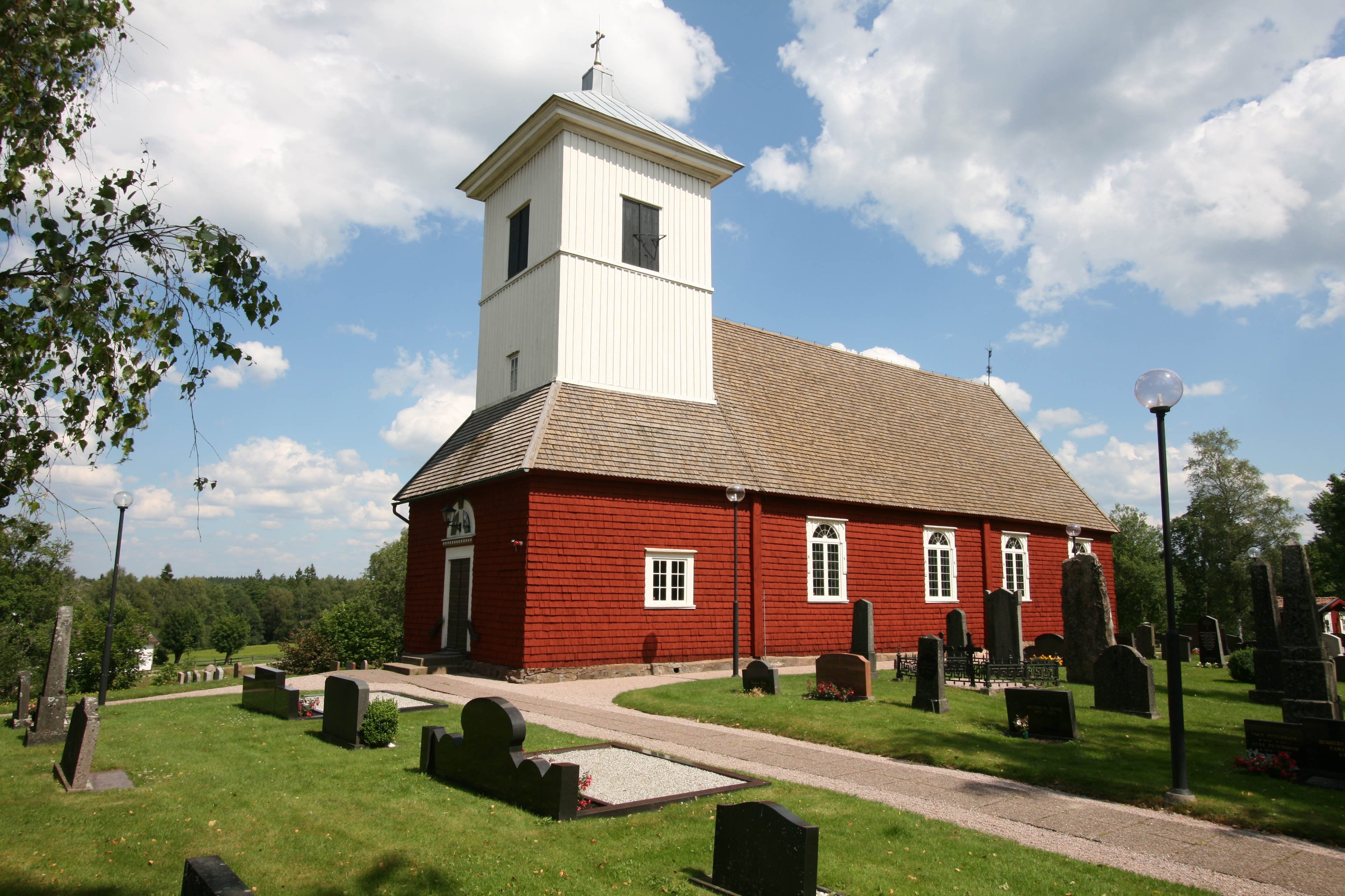 Roasjö kyrka